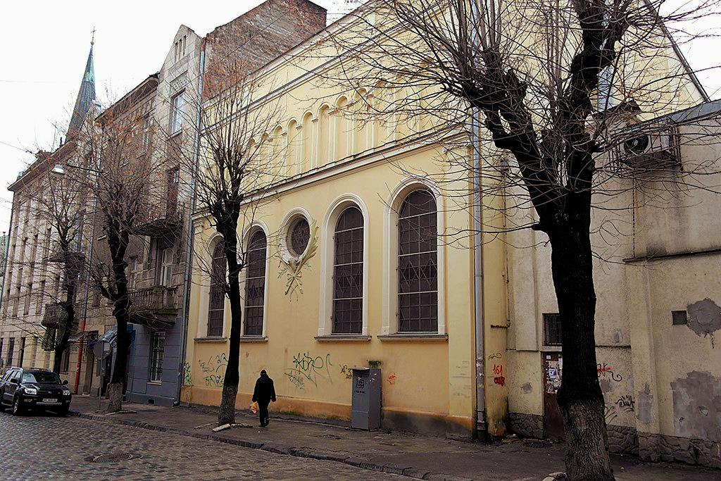 Синагога Цори Гилод во Львове